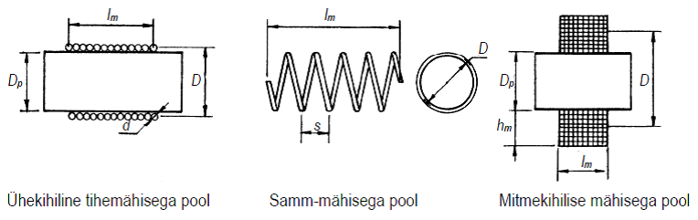 Induktiivpoolide mõõtmed